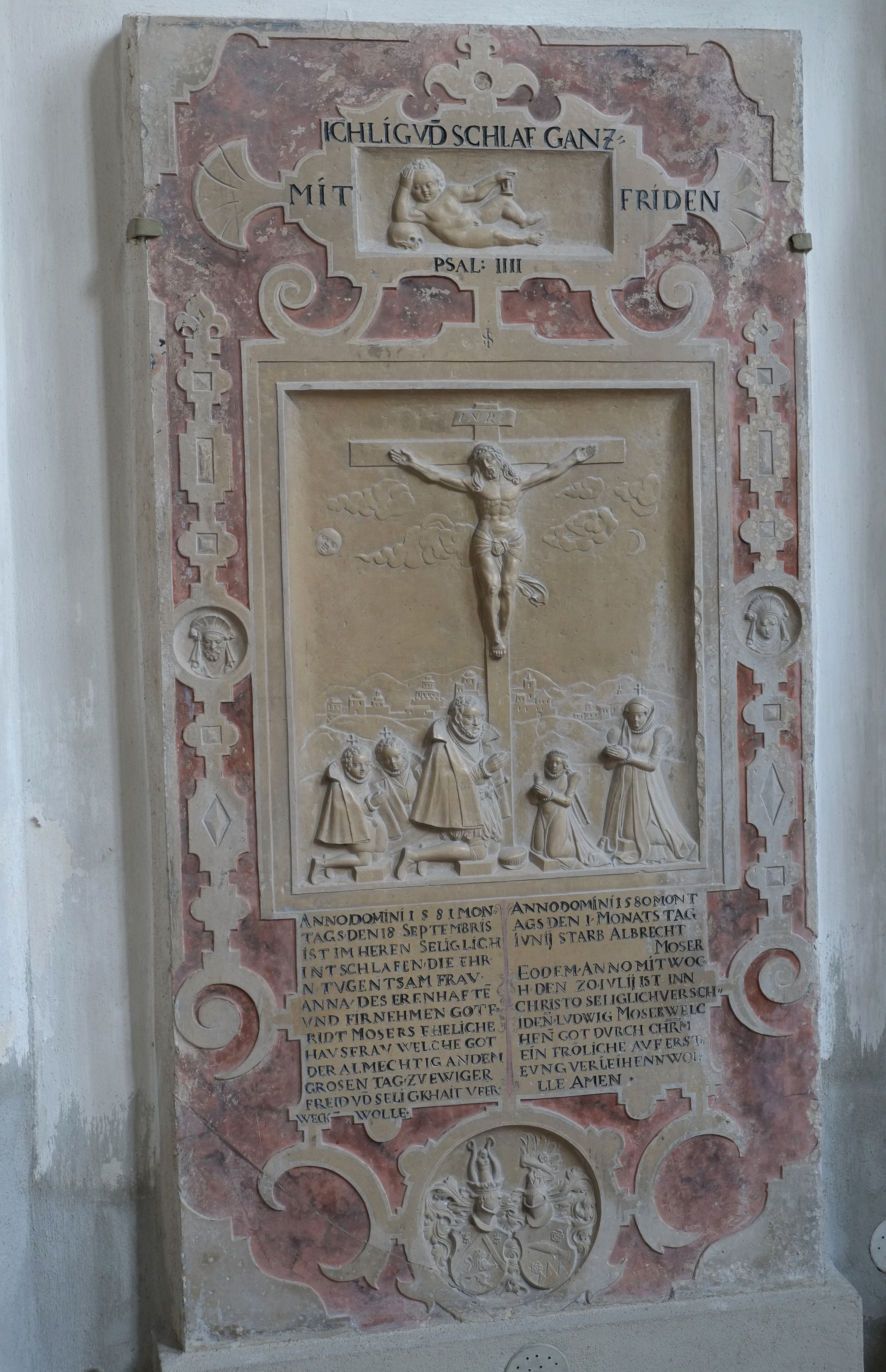 Evangelische Kirche St. Jakob in Oettingen in Bayern (Bayern), Epitaph der Familie Moser (Nr. 26 im Peda-Kunstführer)